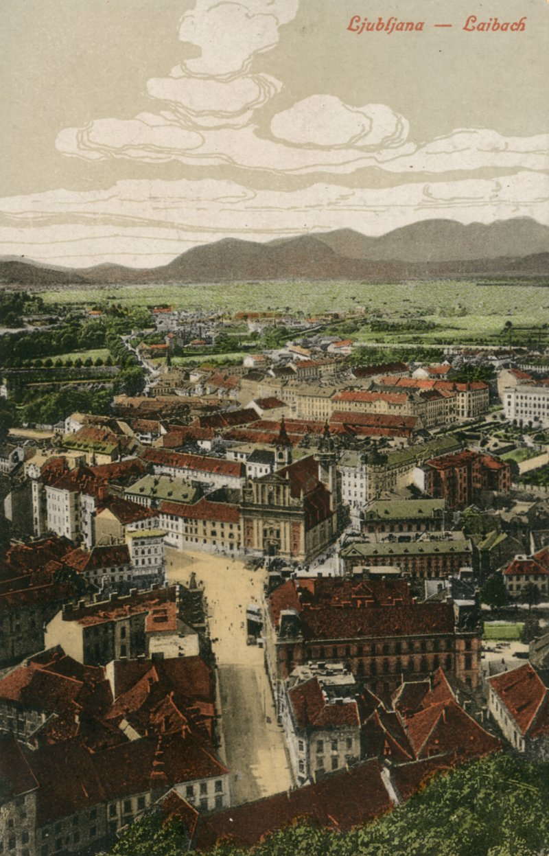 Špitalski most, Marijin trg in pogled proti Šmarni gori z gradu.